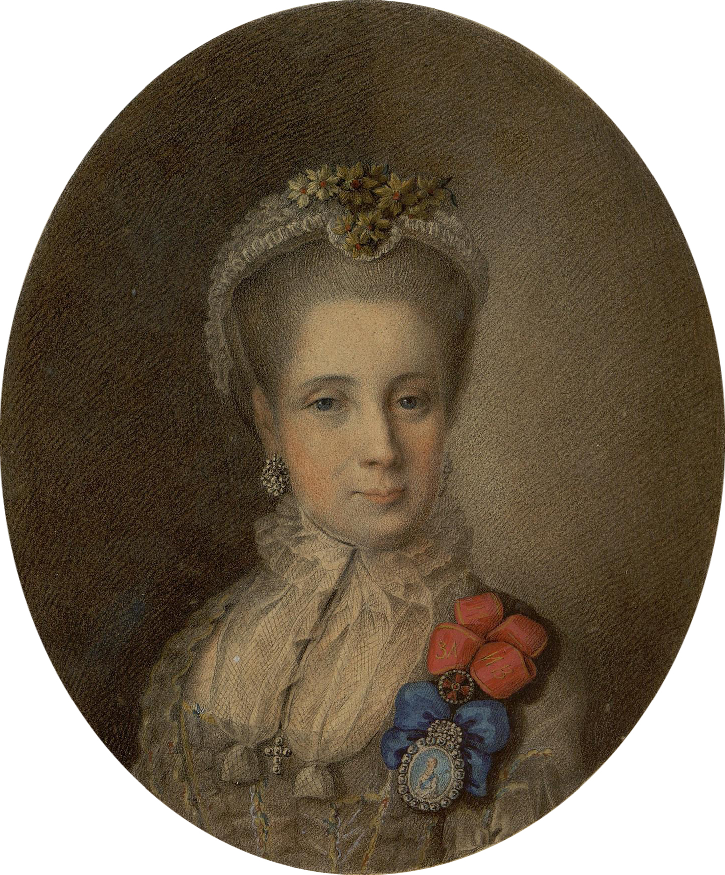 Марина Осиповна Нарышкина, ур. Закревская ?